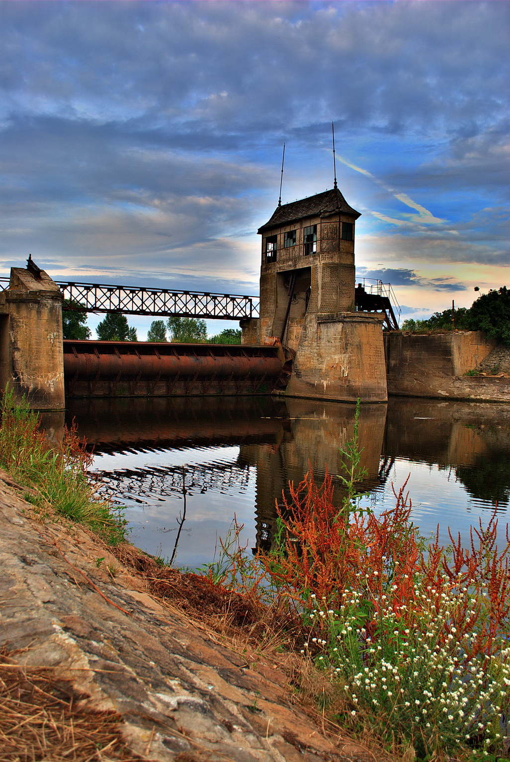 Casa Baraj (stăvilar)